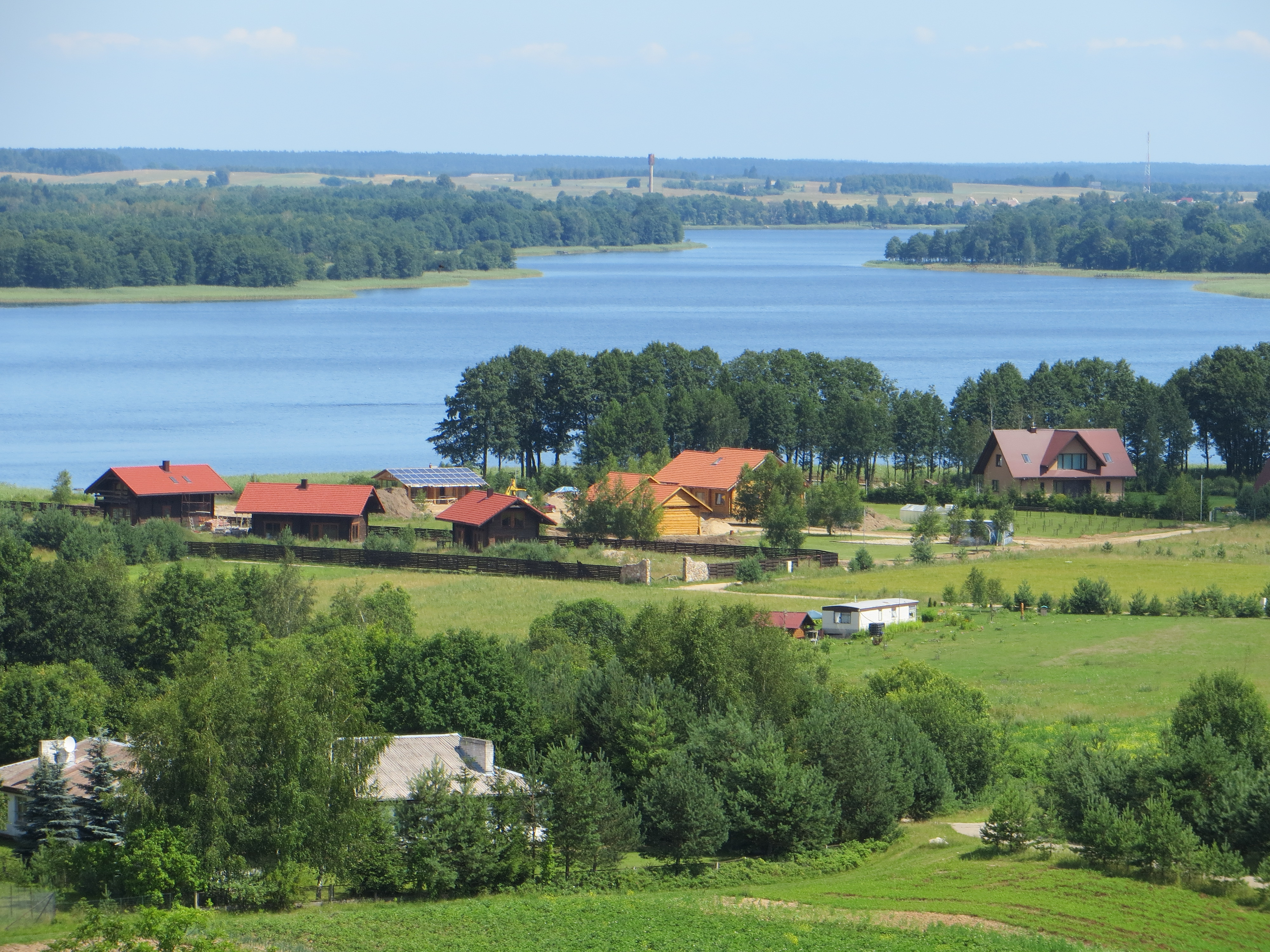 Miežonys, Lithuania